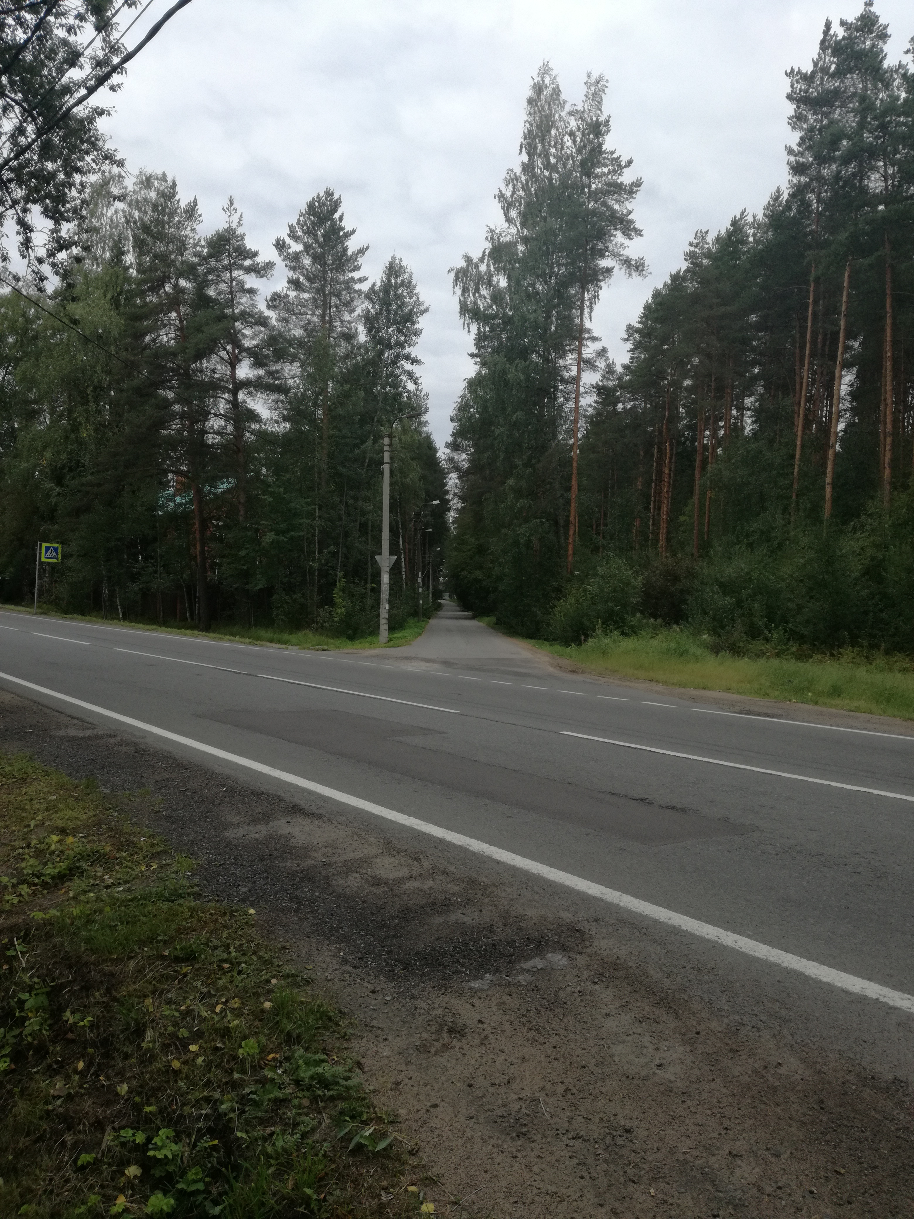 Перекрёсток Лесной и Советской улицы, Песочный